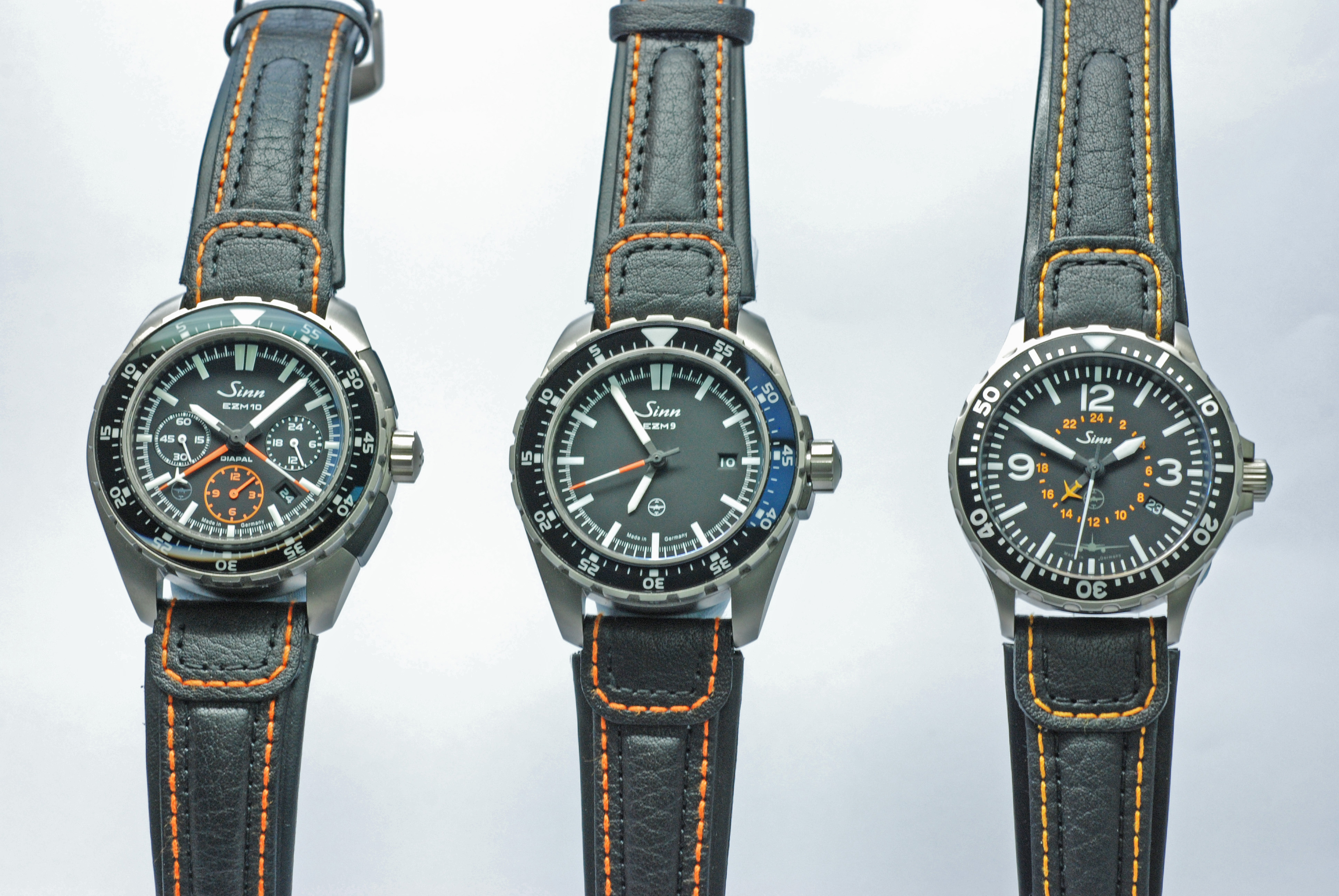 TESTAF-zertifizierte Fliegeruhren von Sinn: EZM 10, EZM 9 und 857 UTC LH Cargo